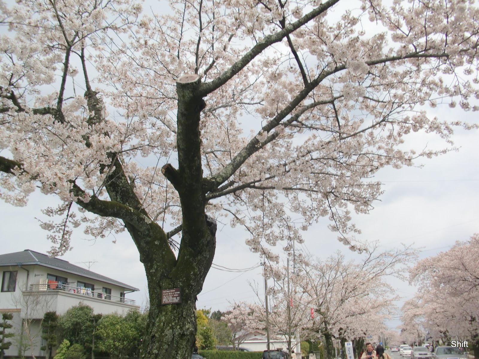 [福島県] 夜ノ森駅近く、夜の森公園。ソメイヨシノの桜並木が2.5kmも続く。まさに桜のトンネルですね。訪れたときには桜は満開。公園も華やかなムードでした。